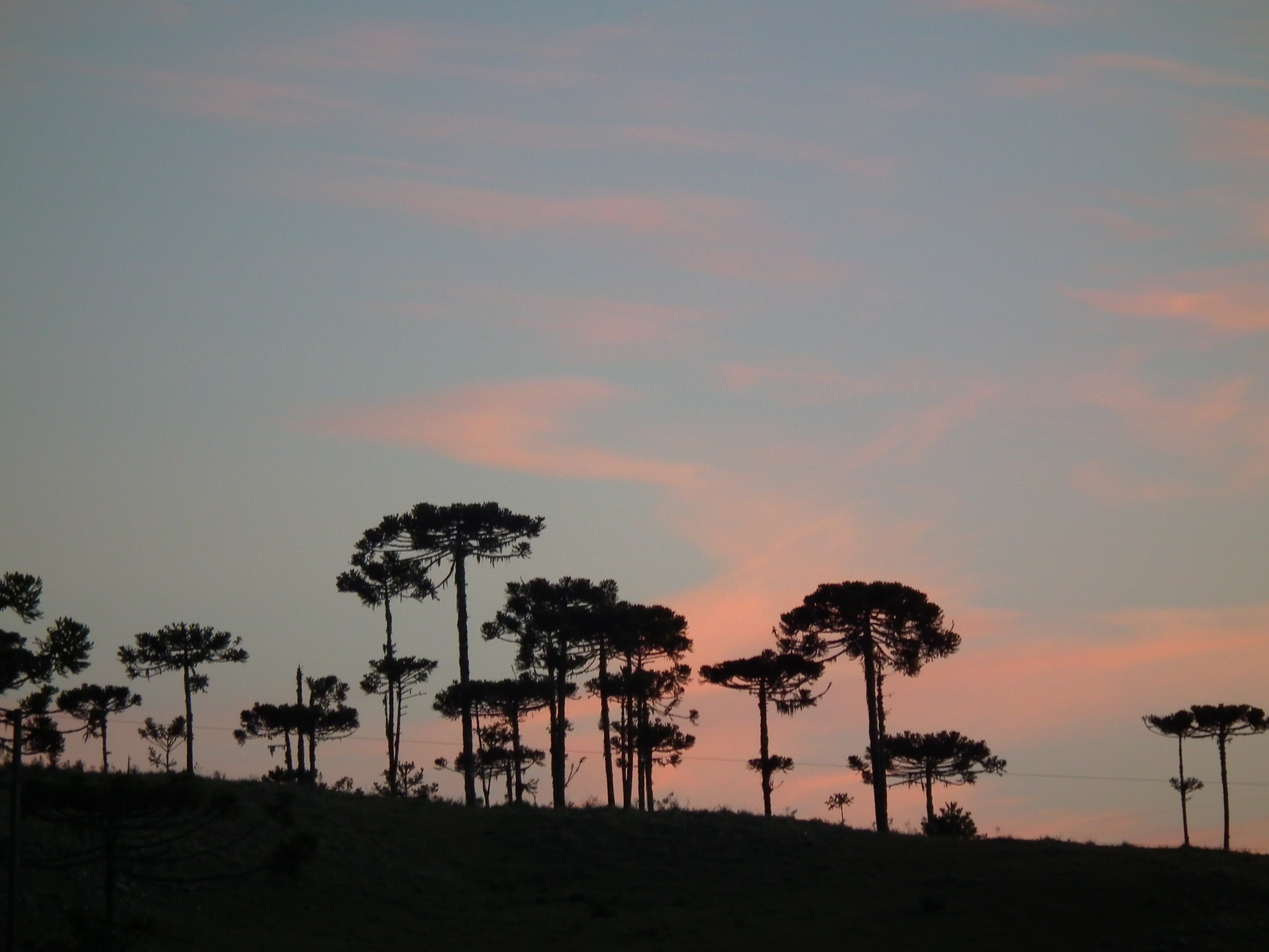 Araucárias na Serra Catarinense